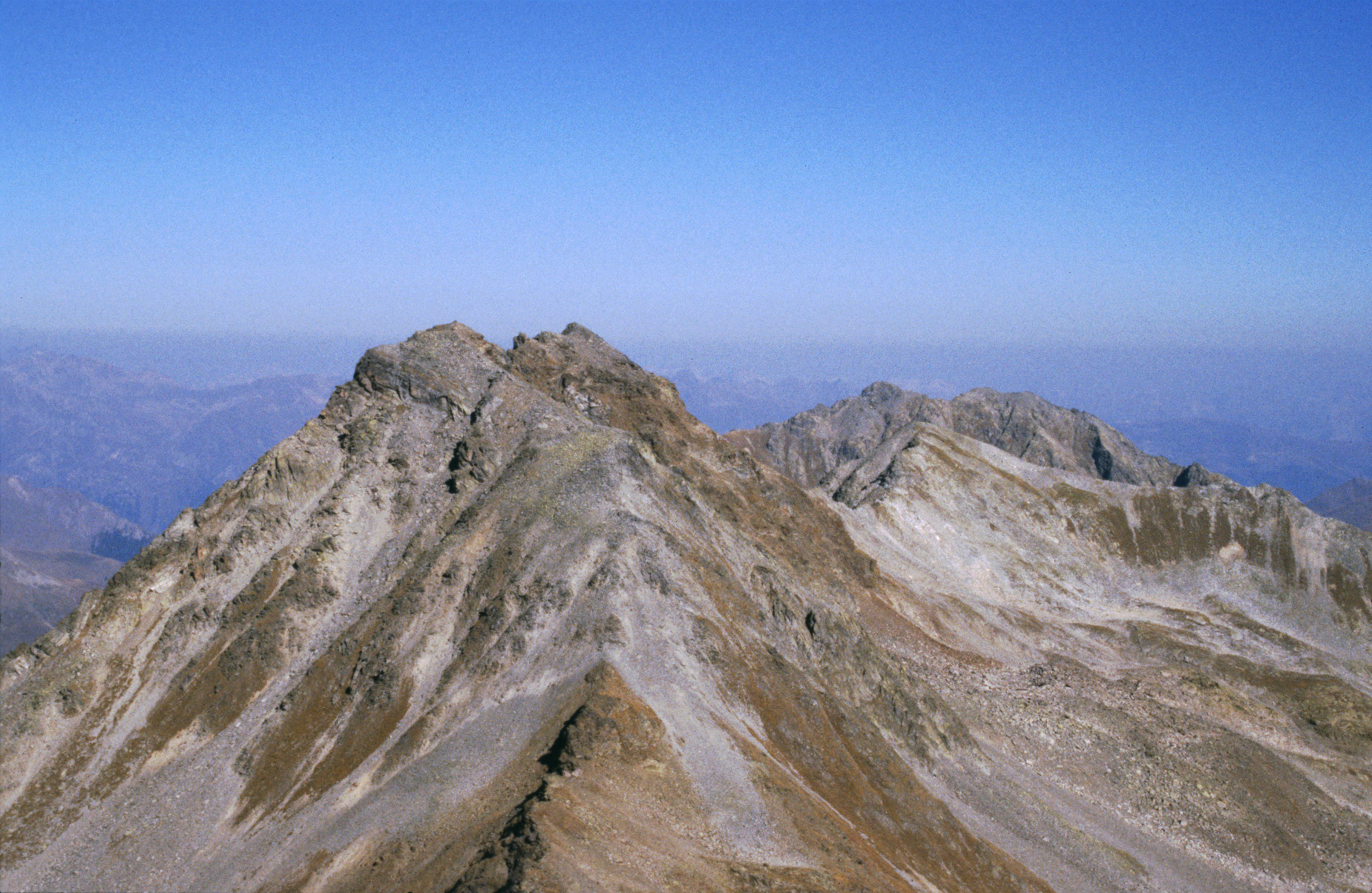 Seekarköpfe von Süden, von der Nauderer Hennesiglspitze, rechts schaut der Wildnörderer vorbei